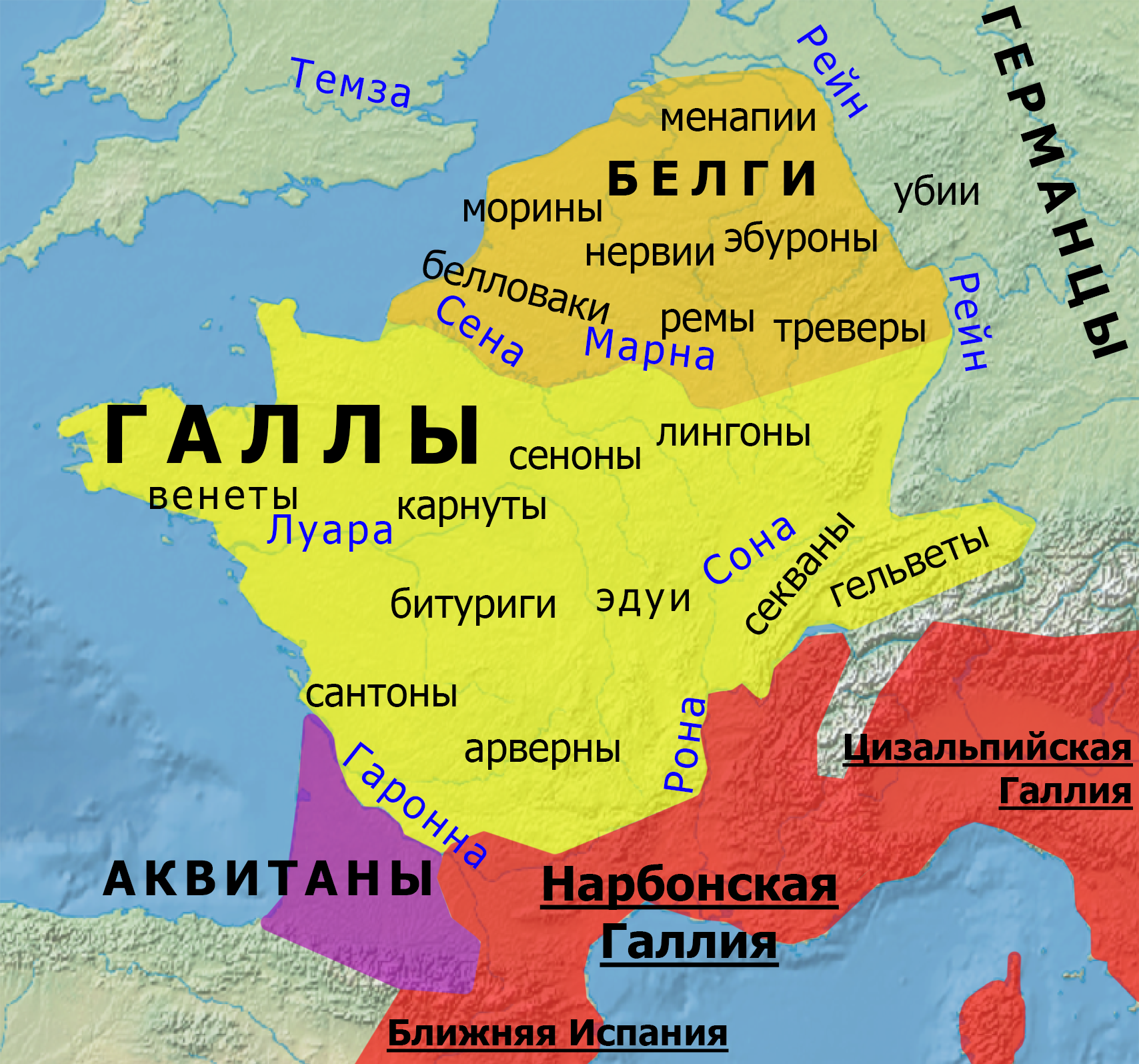 Галлия к 58 году до н. э. и основные племена.